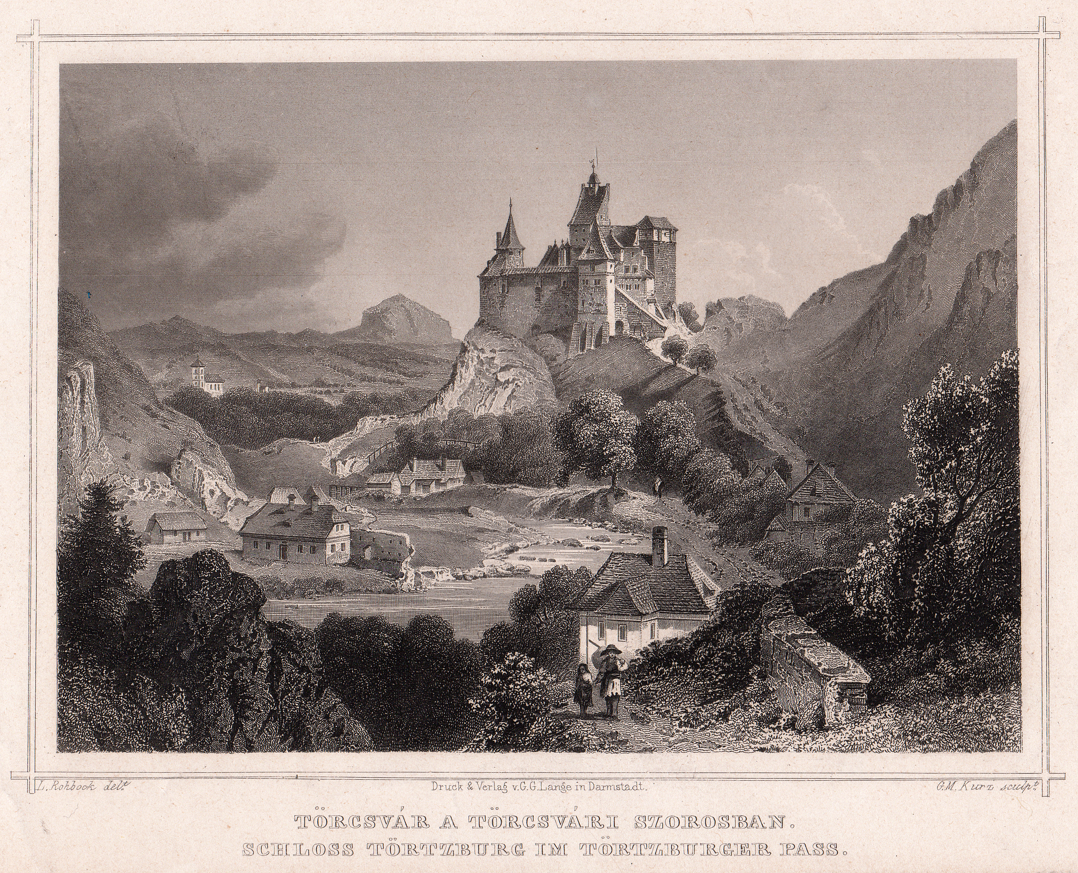 Ludwig Rohbock acélmetszete Törcsvárról. A vár I. Lajos magyar király engedélyével, 1377-ben épült a mellette elhaladó, fontos kereskedelmi út ellenőrzésére és a havasalföldi román vajdák betörései ellen. Fekvéséből adódóan a nehezen bevehető várak közé tartozott.